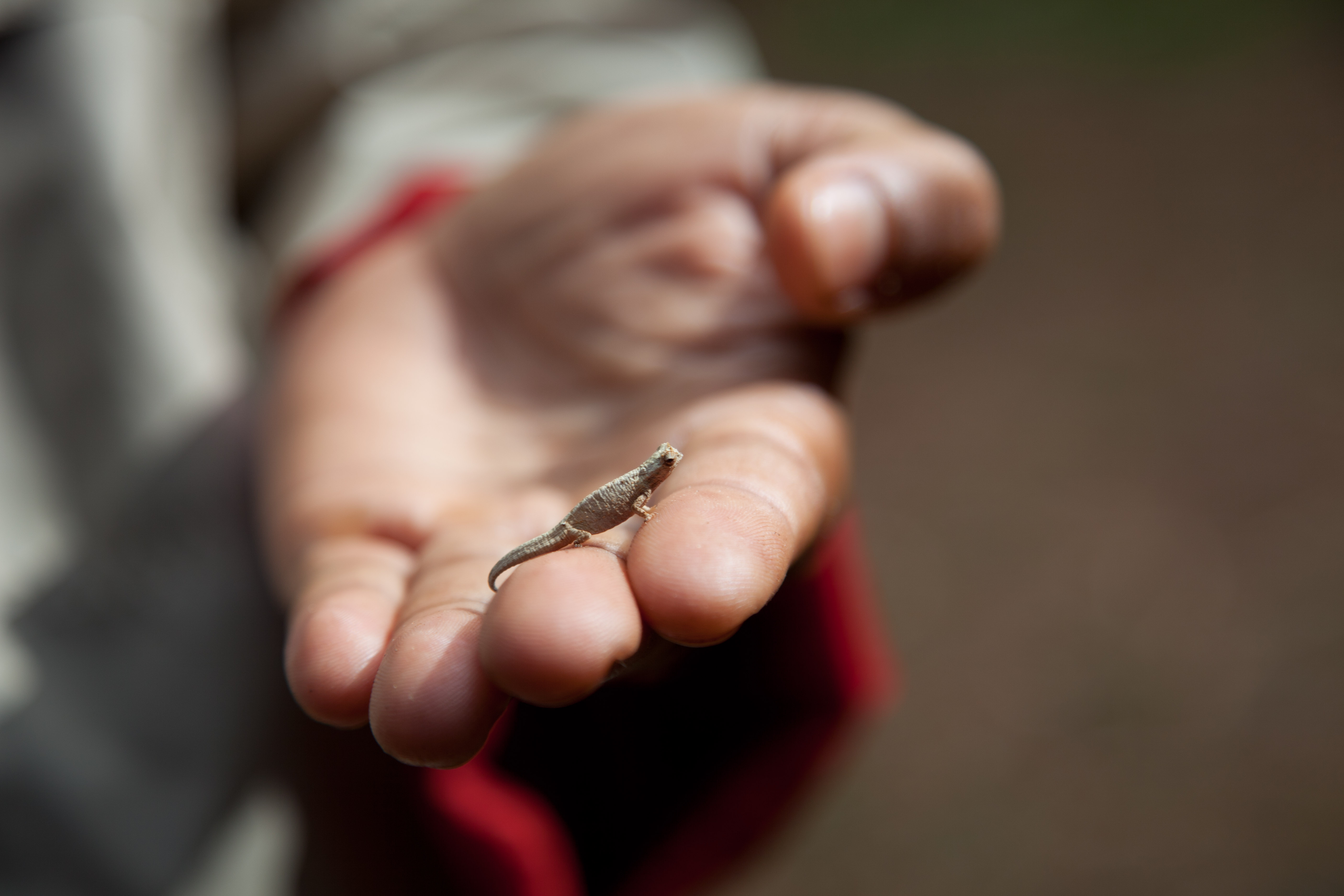 Brookesia tuberculata - Montagne D'Ambre NP